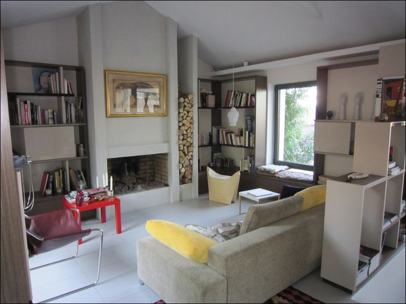 Salon d'une maison à Paris